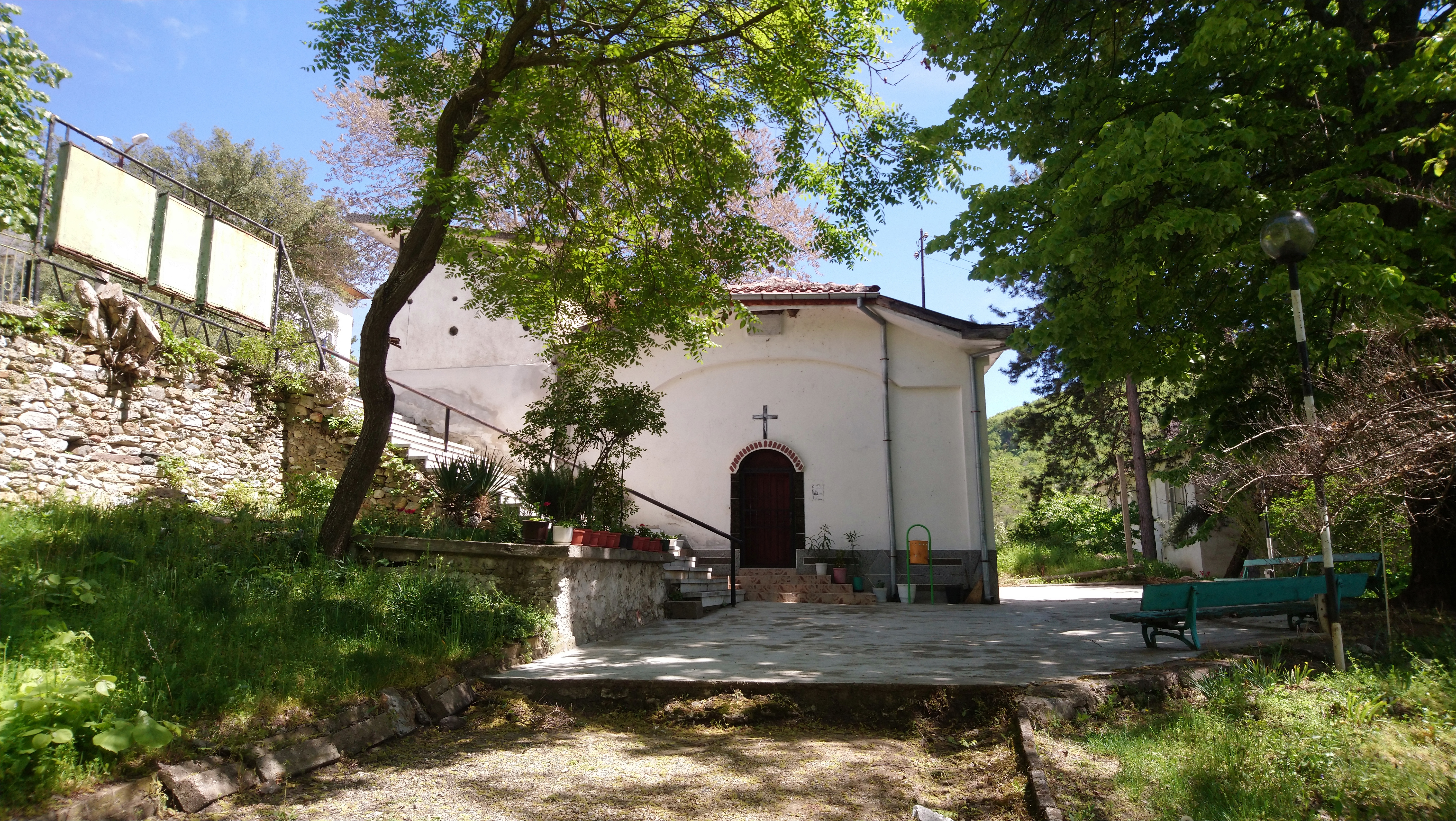 Църква Успение на Света Богородица, село Петрово, област Благоевград